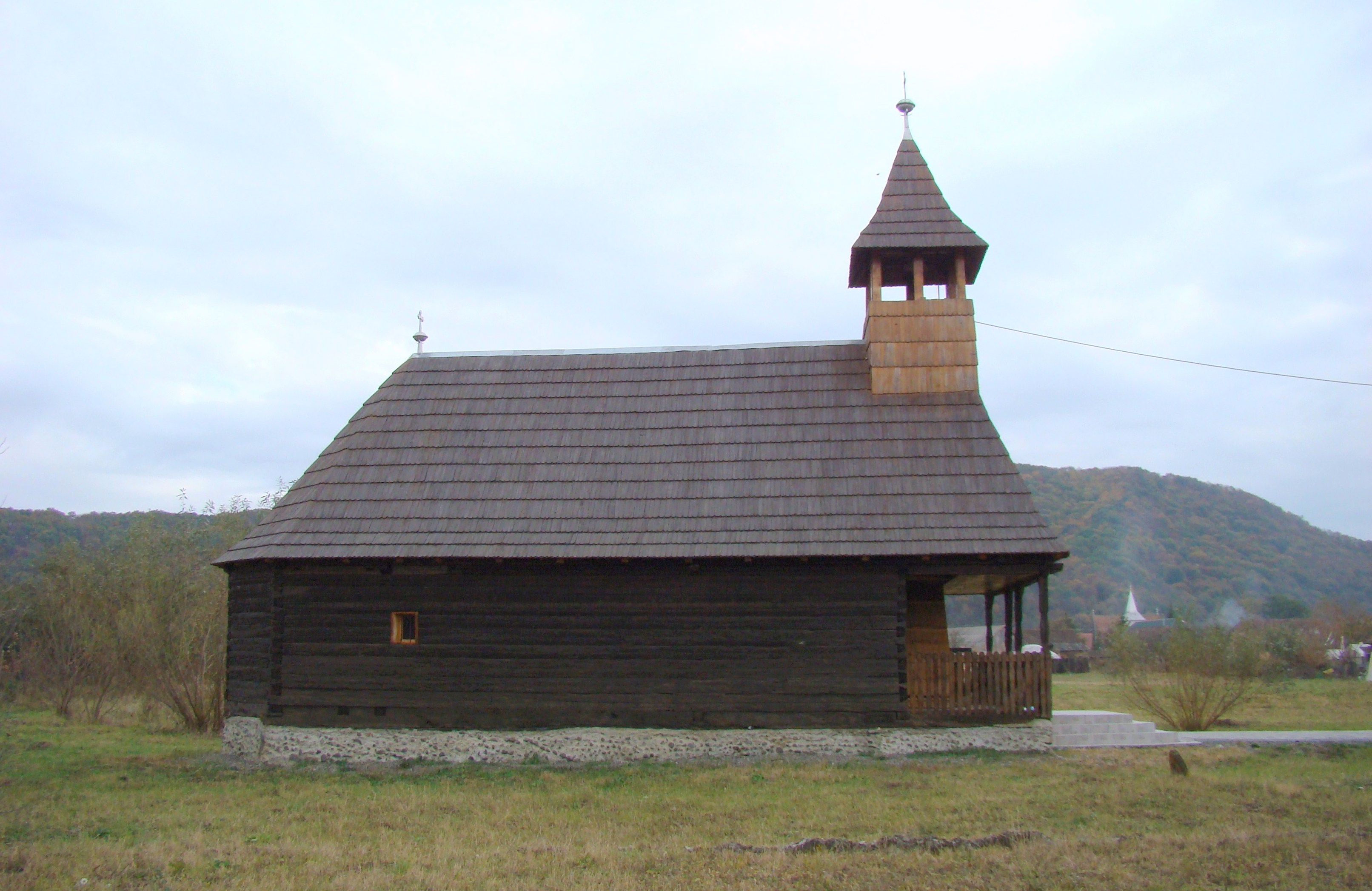 Biserica de lemn din Miercurea Nirajului (Sântandrei), Mureș